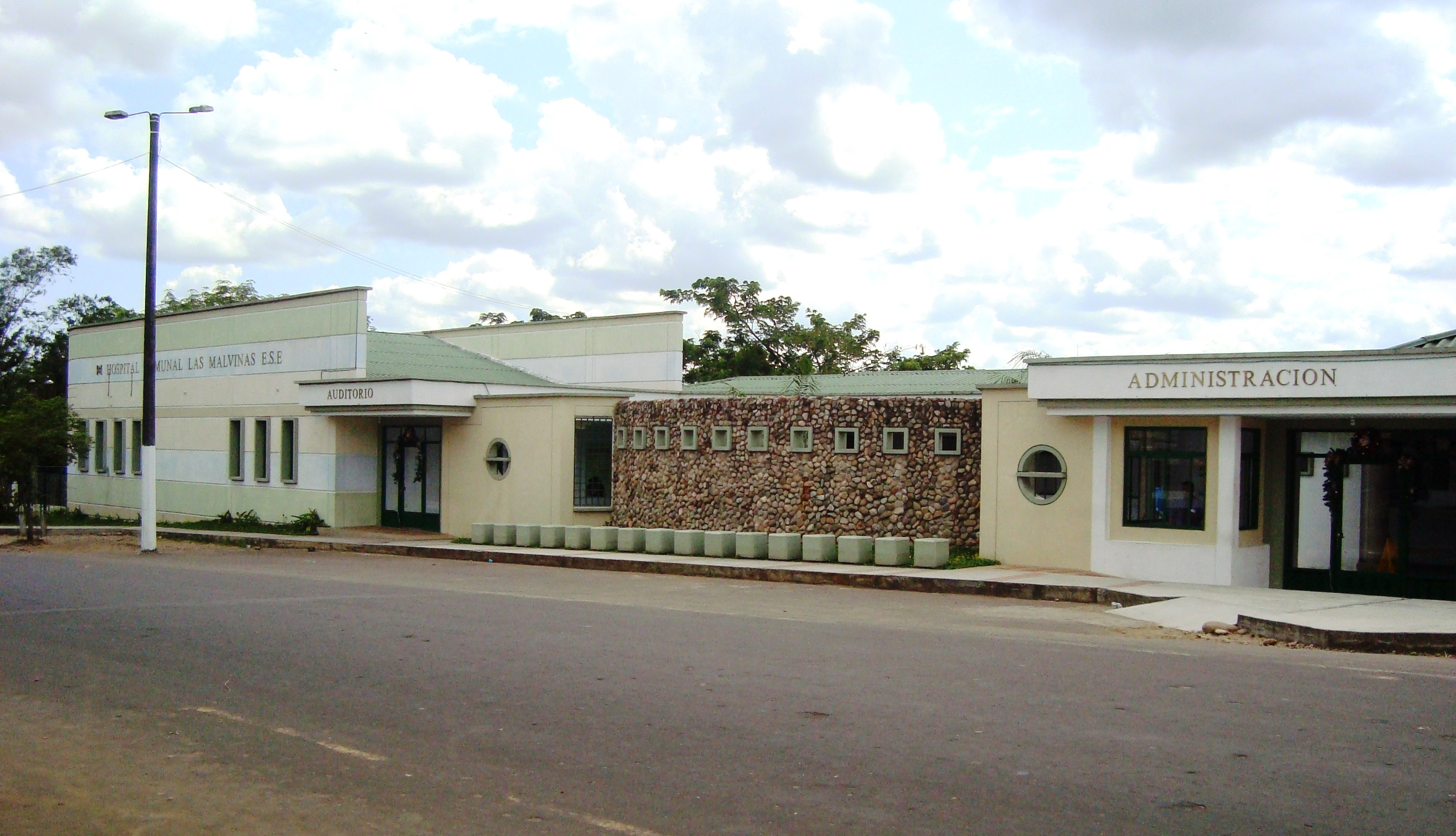 Edificio administrativo del Hospital Comunal Malvinas de Florencia (Caquetá).